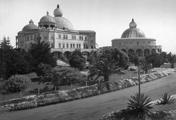 Raja-Yoga-Akademie (links) und Tempel des Friedens (rechts) auf Lomaland, San Diego, Kalifornien. Lomaland gehörte zur Theosophischen Gesellschaft in Amerika (Theosophische Gesellschaft Point Loma). Etwa 1915.